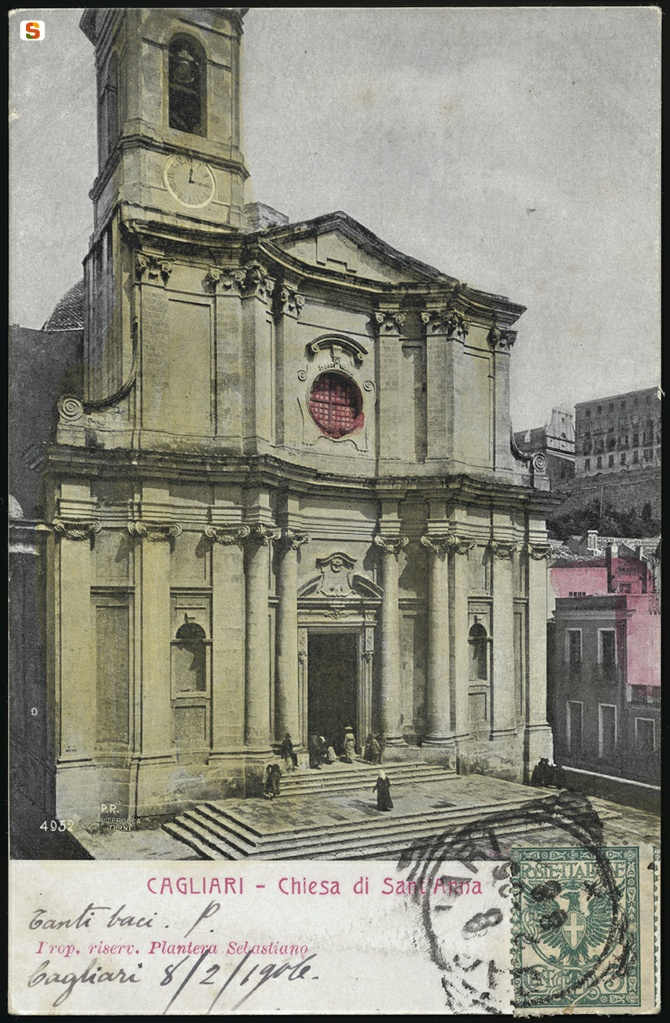 Sant'anna con un solo campanile.